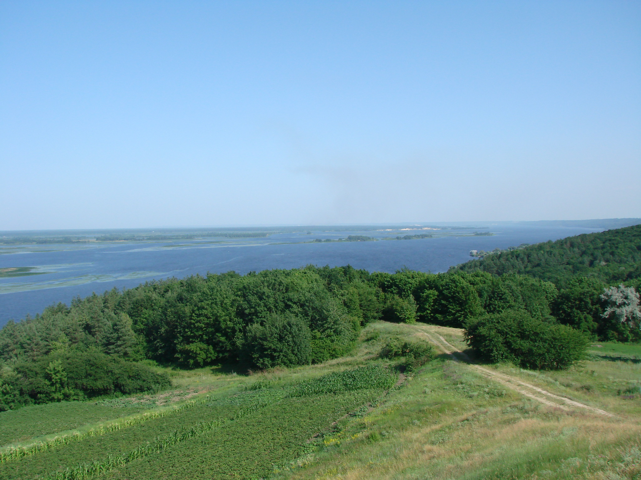 Дніпро біля села Витачів: Дніпро біля села Витачів